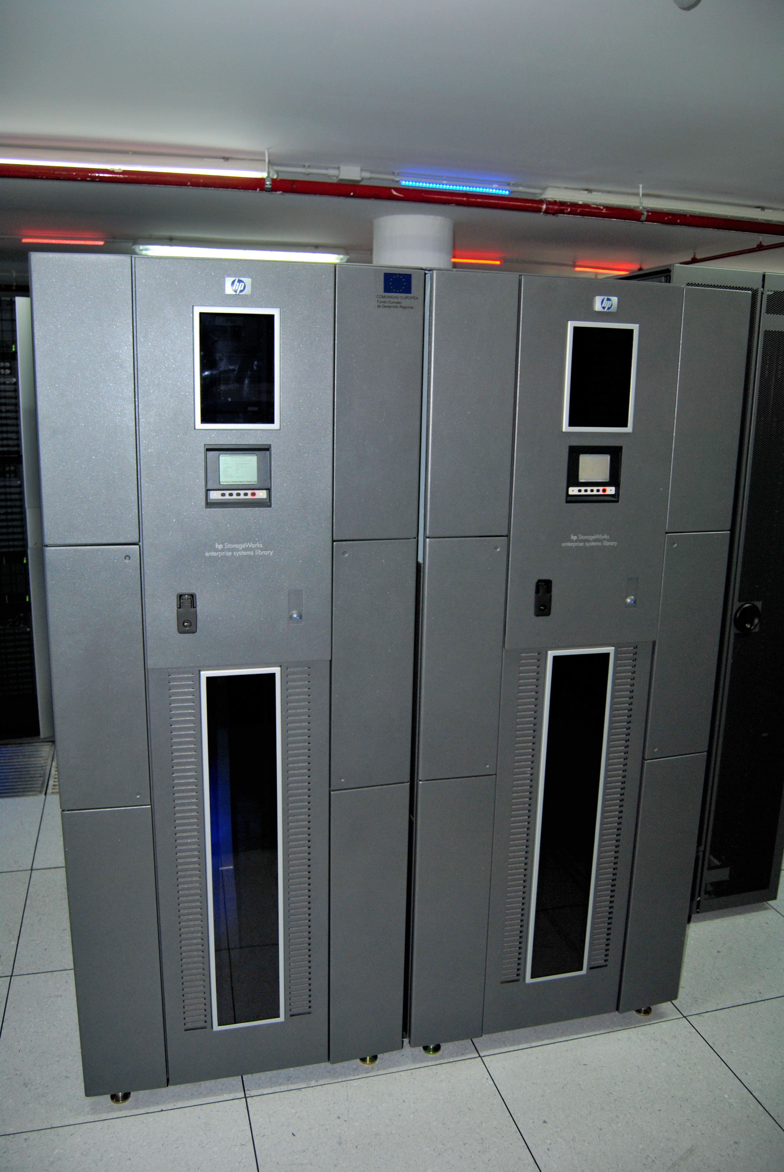 HP ESL 712e Librería de cintas de almacenamiento